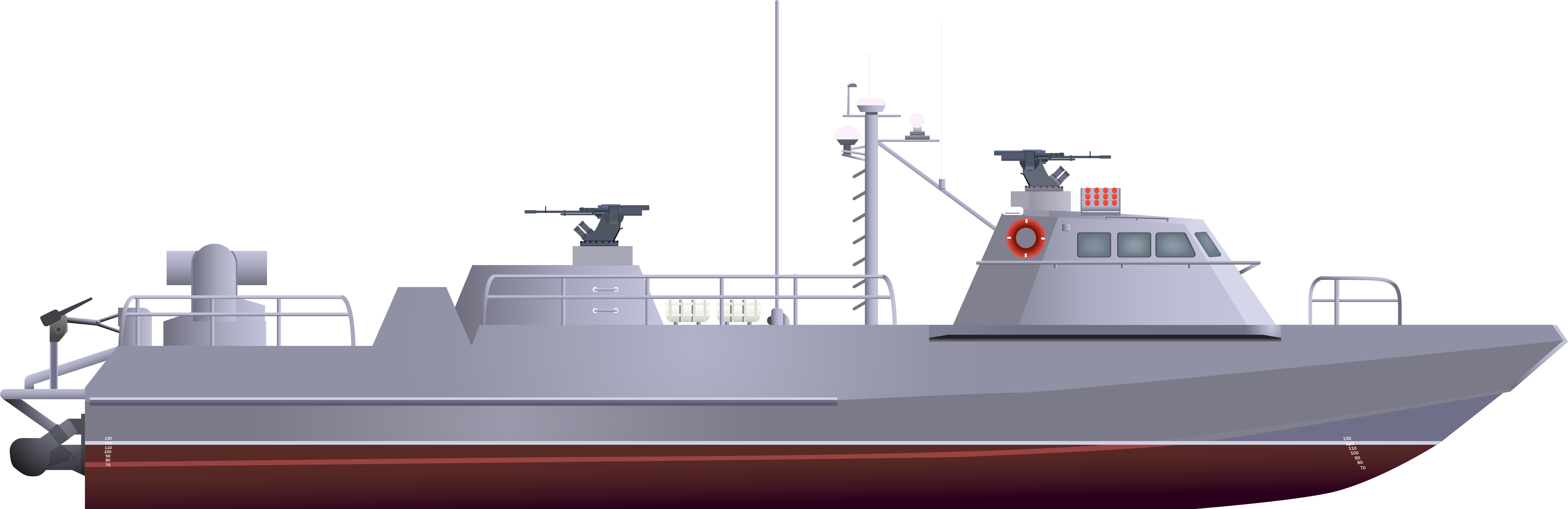 Броньований десантно-штурмовий катер проекту 58503 [1](шифр «Кентавр-ЛК») — тип броньованих десантно-штурмових катерів, створених в дослідно-проектному центрі кораблебудування в Миколаєві. Оригінально проект мав номер 58181 (шифр «Кентавр»), і мав за базу малі броньовані артилерійські катери проекту 58155 «Гюрза-М»,[2] проте був удосконалений за час будівництва. Призначений для несення патрульної служби на річках і прибережних морських акваторіях, доставки та висадки десантів.